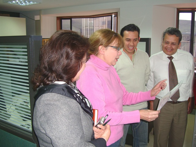 En la foto aparecen: Nohra Patricia Vela (Coordinadora Grupo de Administración de Documentos) -- Maritza Hidalgo (Secretaria General) -- Julio César Cruz -- Héctor Chala.